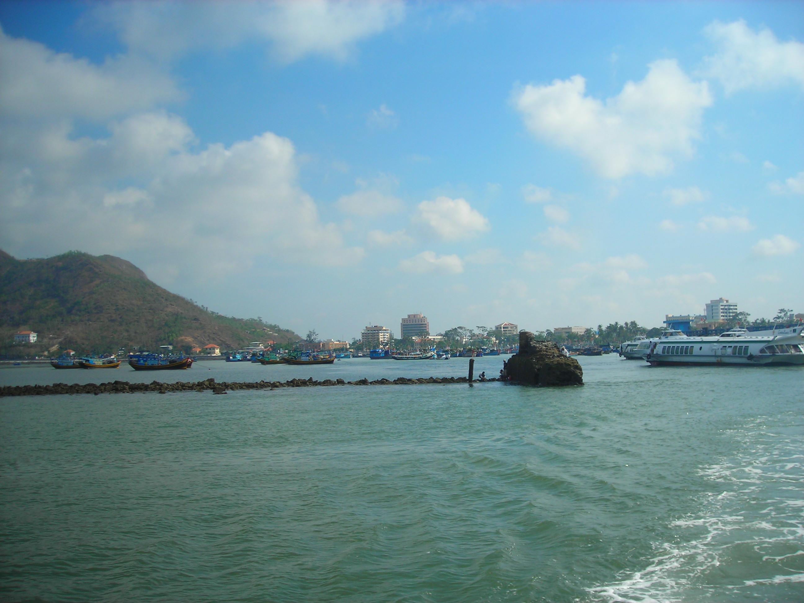 Front Beach Vung Tau